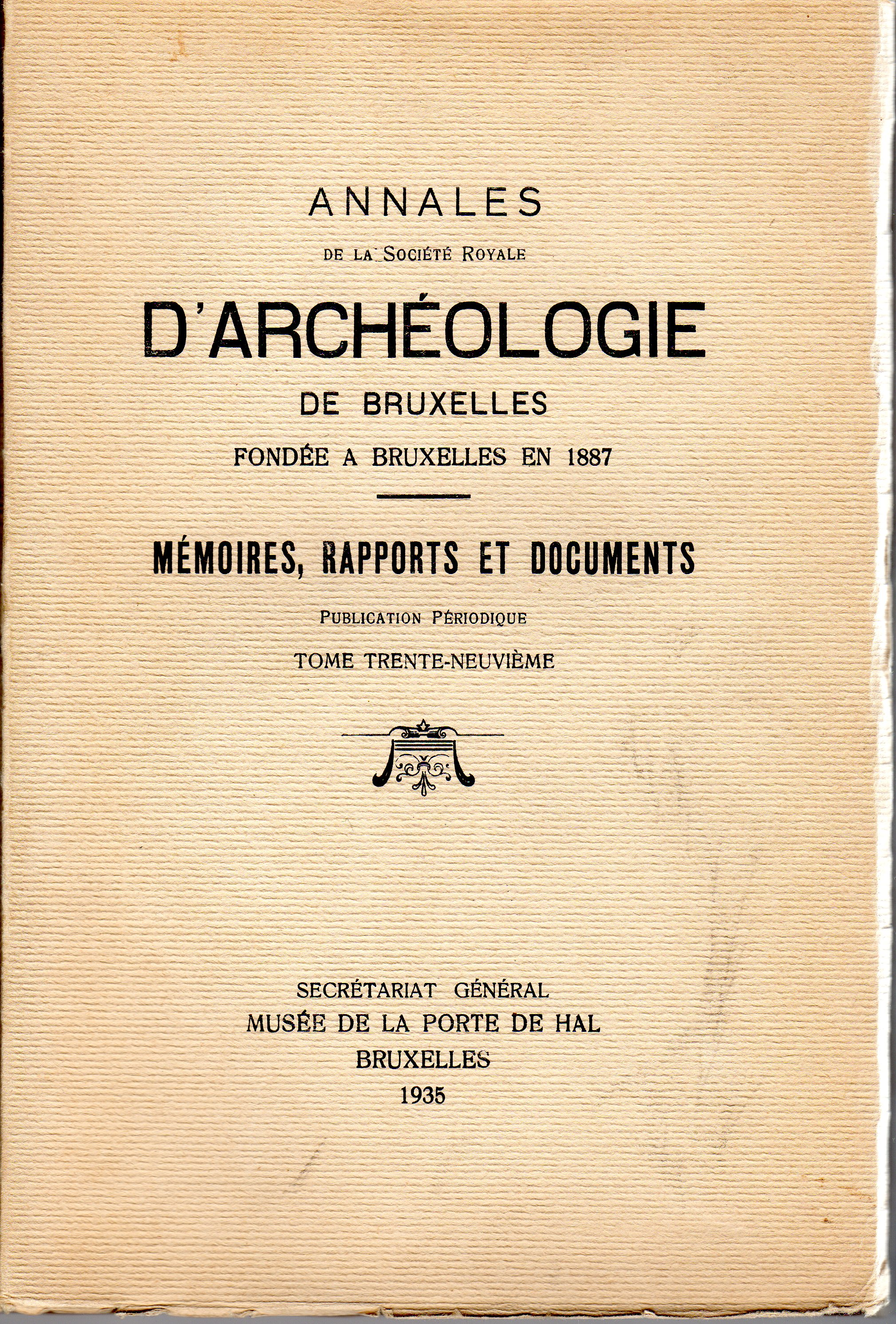 Page de couverture du tome XXXIX année 1935, des "Annales de la Société Royale d'Archéologie de Bruxelles", tome XXIX année 1935, des presses de l'Imprimerie Alphonse Ballieu, chaussée de Louvain, 13 Saint-Josse Bruxelles 3